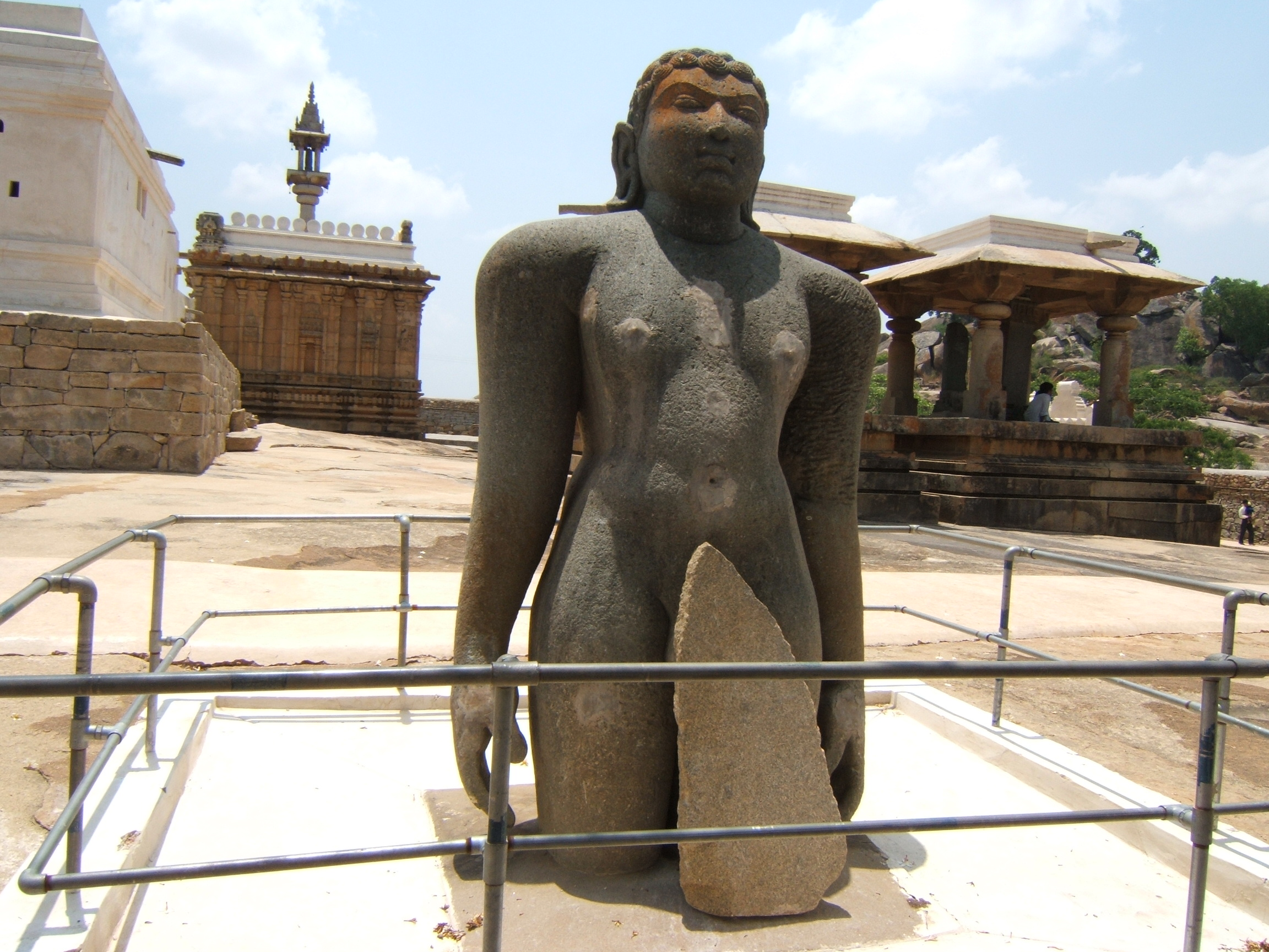 Shravanabelagola, Karnataka, India